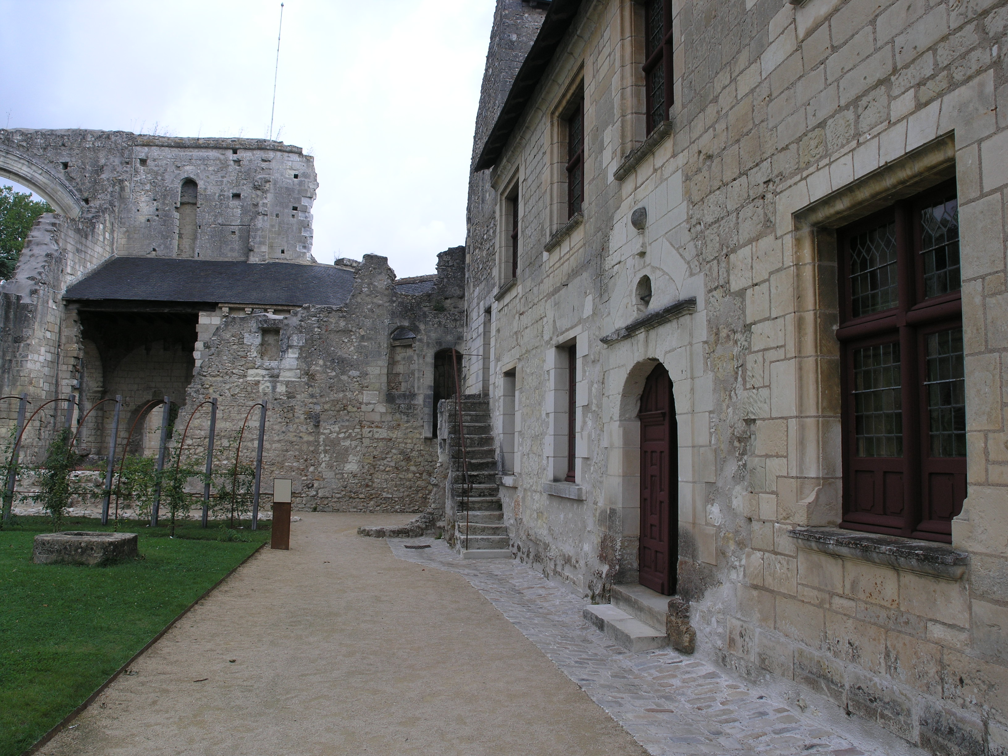 Innenhof des Monuments Prieuré de Saint-Cosme, rechts das Haus des Ronsard mit Dokumentation seines Lebens